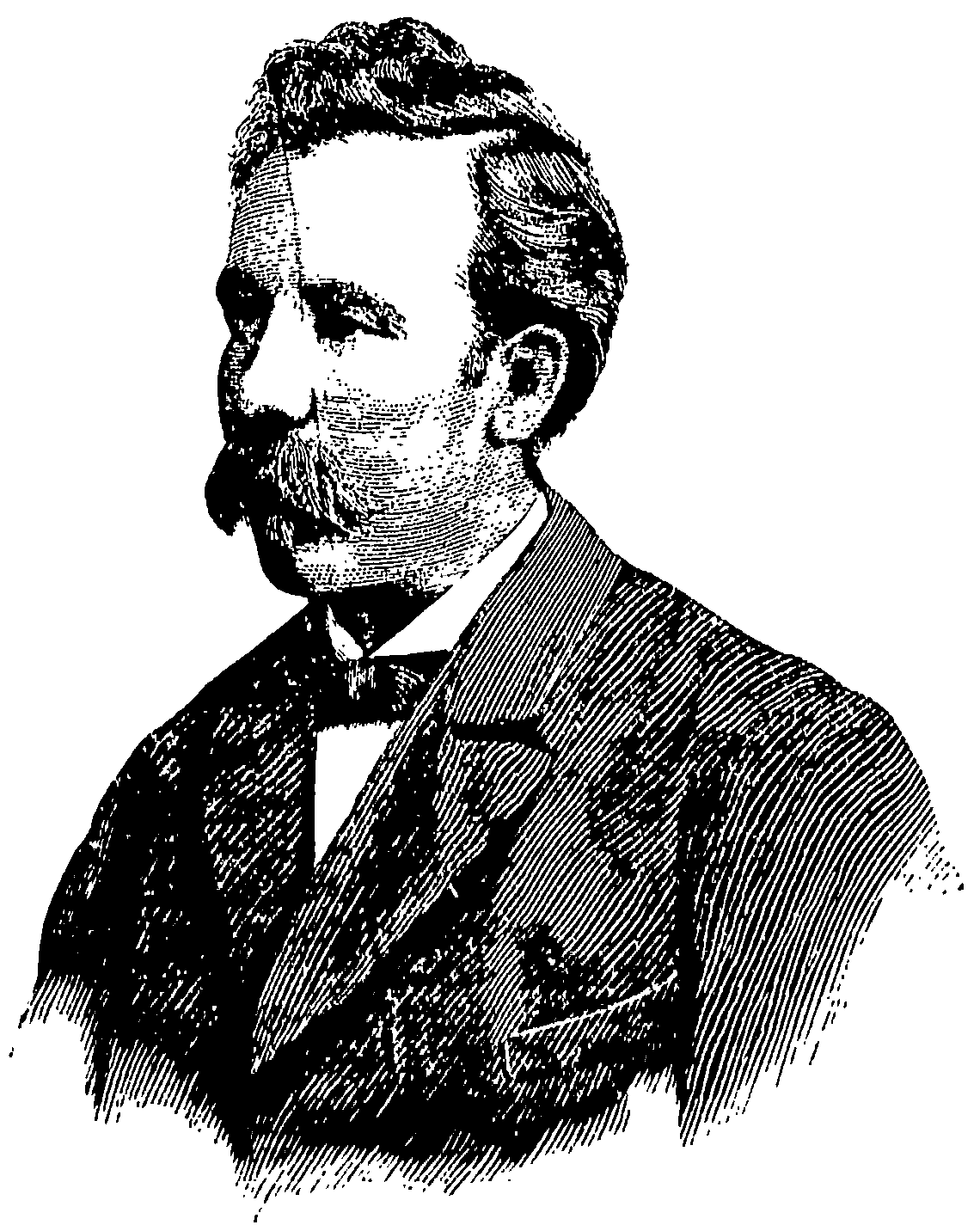 Jon Hol.